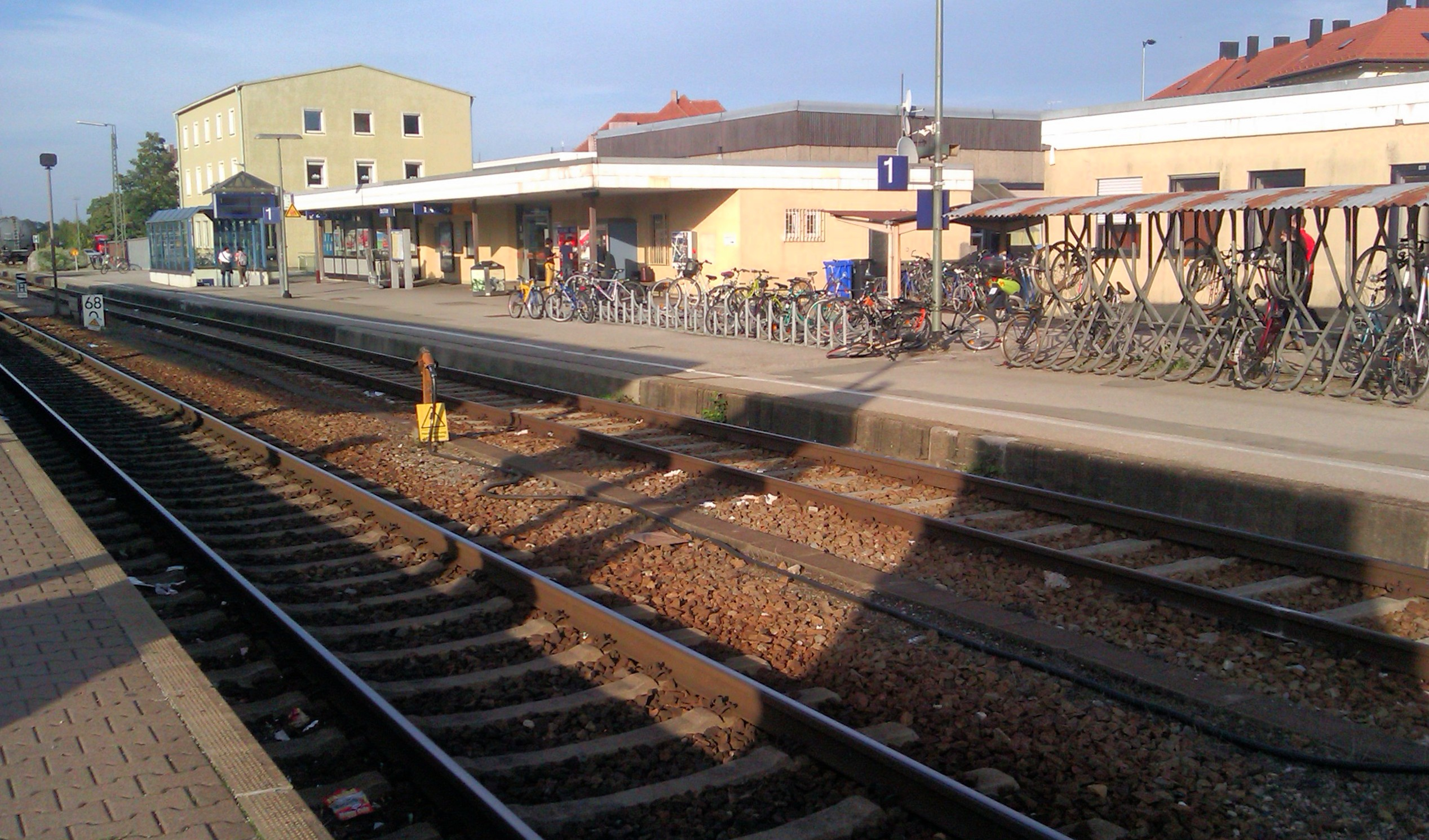 Westansicht des Bahnhof Buchloe im Jahre 2012